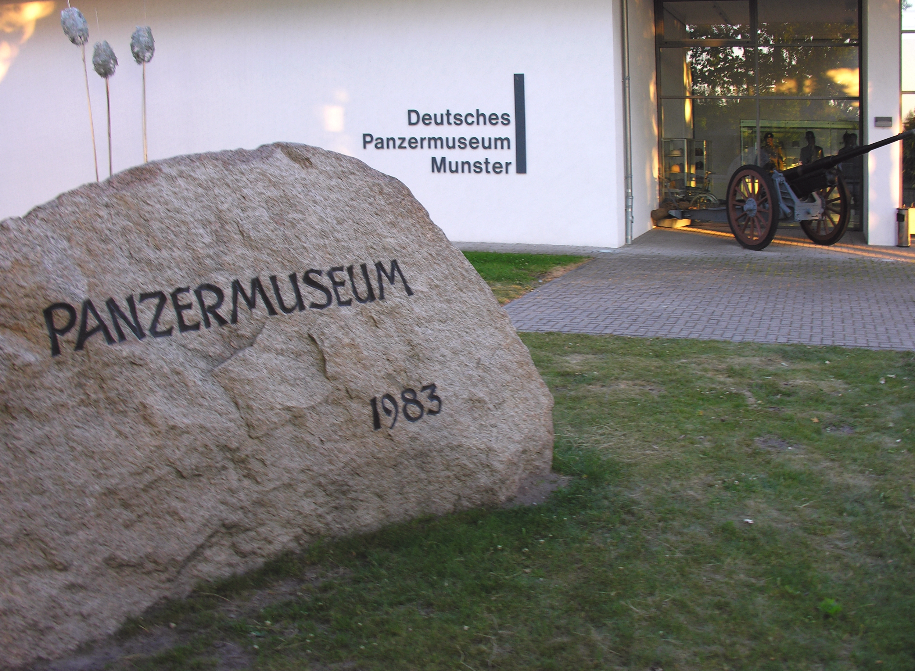 Das Deutsche Panzermuseum geht auf das Gründungsjahr 1983 zurück: hier eine steinerne Erinnerung in den Aussenanlagen; Ort Munster Niedersachsen - Foto 2010 Wolfgang Pehlemann Steinberg Ostsee DSCN5199